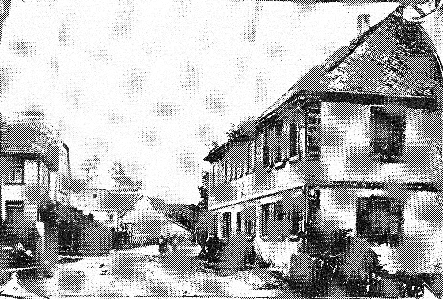 Die Ortsdurchfahrt von Weidnitz in Richtung Burgkunstadt (heutige B289). Ausschnitt aus einer Postkarte von Weidnitz im Jahr 1914